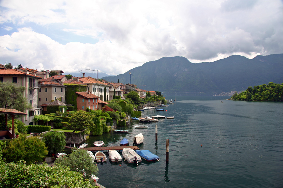 Veduta del paese di Ossuccio (CO) sul lago di Como. Sulla destra l'isola Comacina.